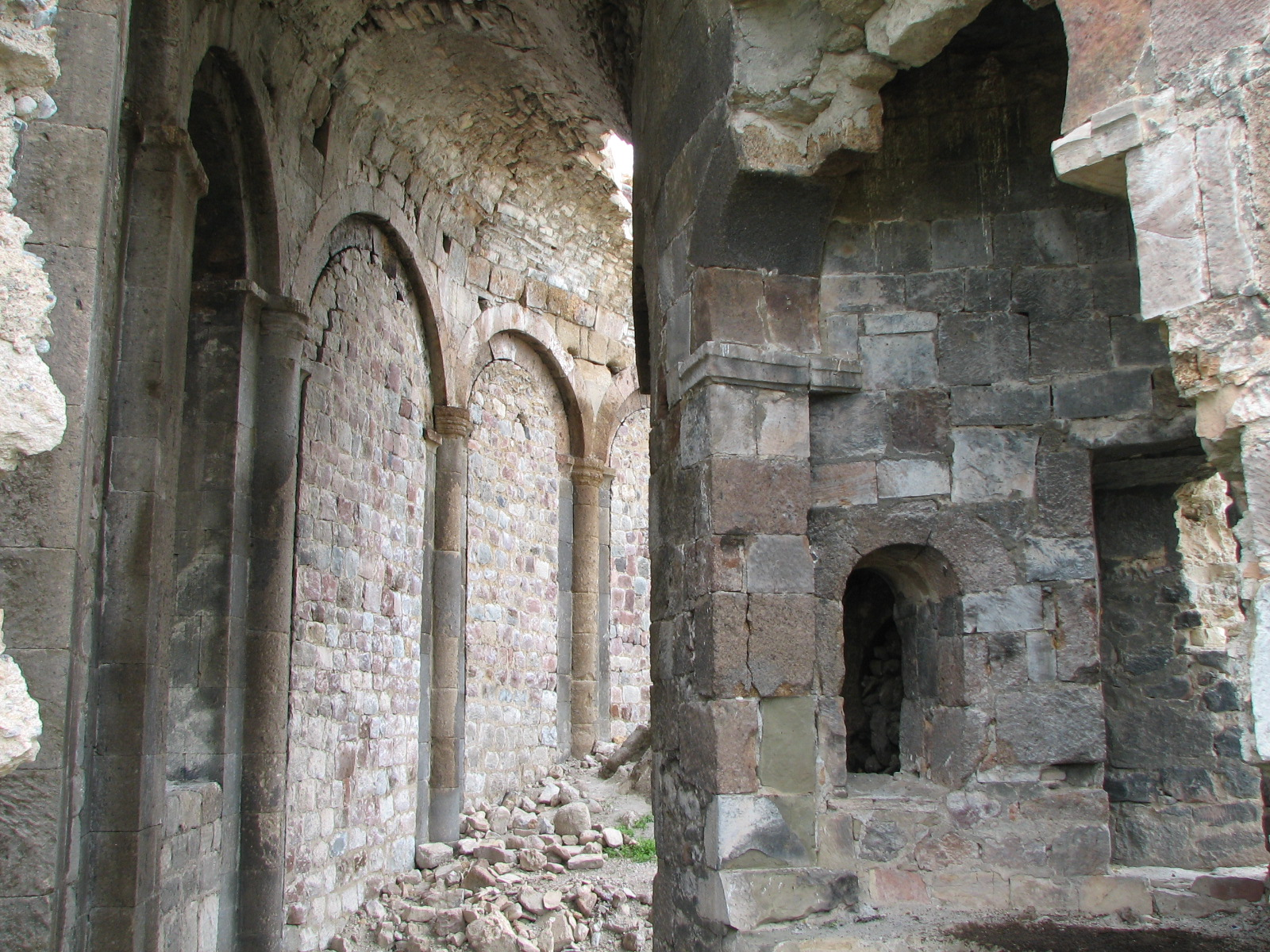 Бана, Тао, Турция. Май 2008